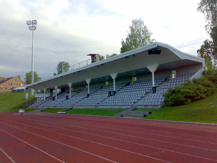 Kaurialan kenttä